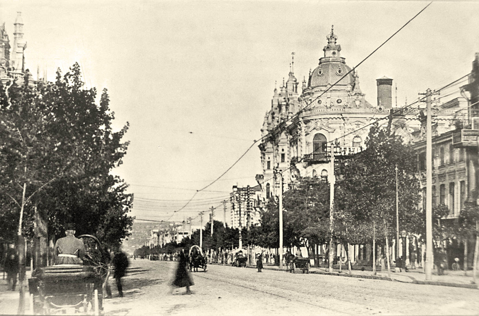 Ростов-на-Дону до Октябрьской революции. Большая Садовая улица.